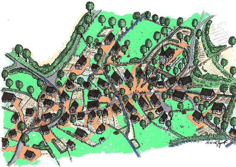 Rekonstruktion des Ortes Elspe vor 1800